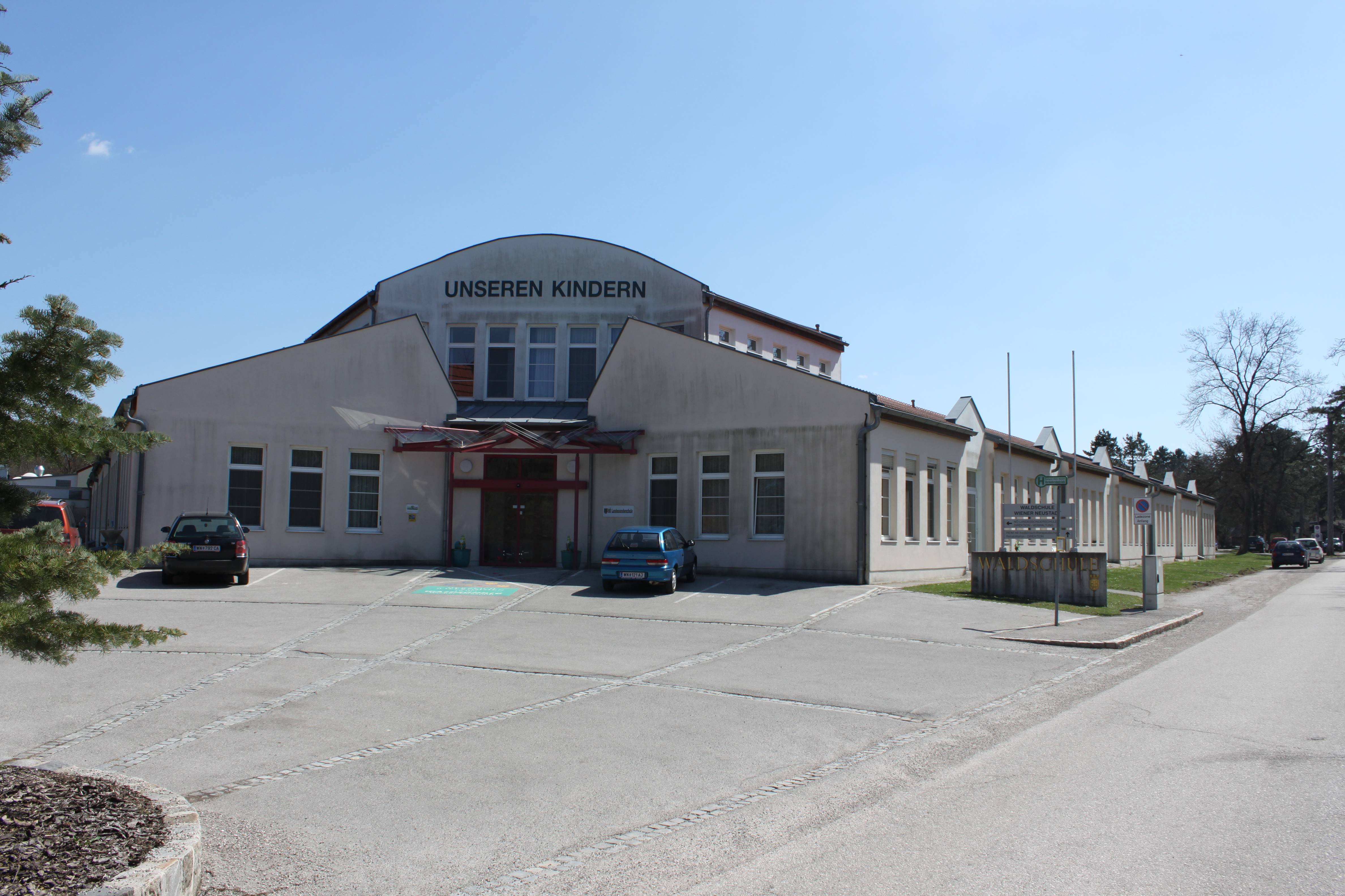 Waldschule in Wiener Neustadt, Hauptgebäude, Eingang